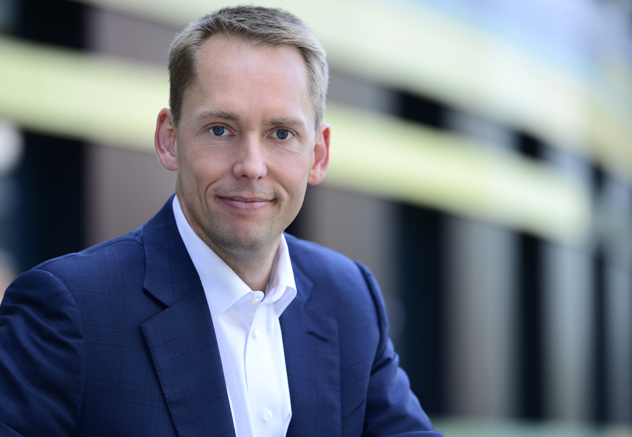 Matthias Kolbusa